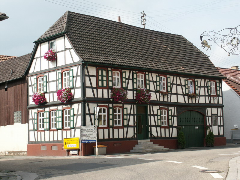 Neuburg am Rhein, Fachwerkhaus Hauptstr.1